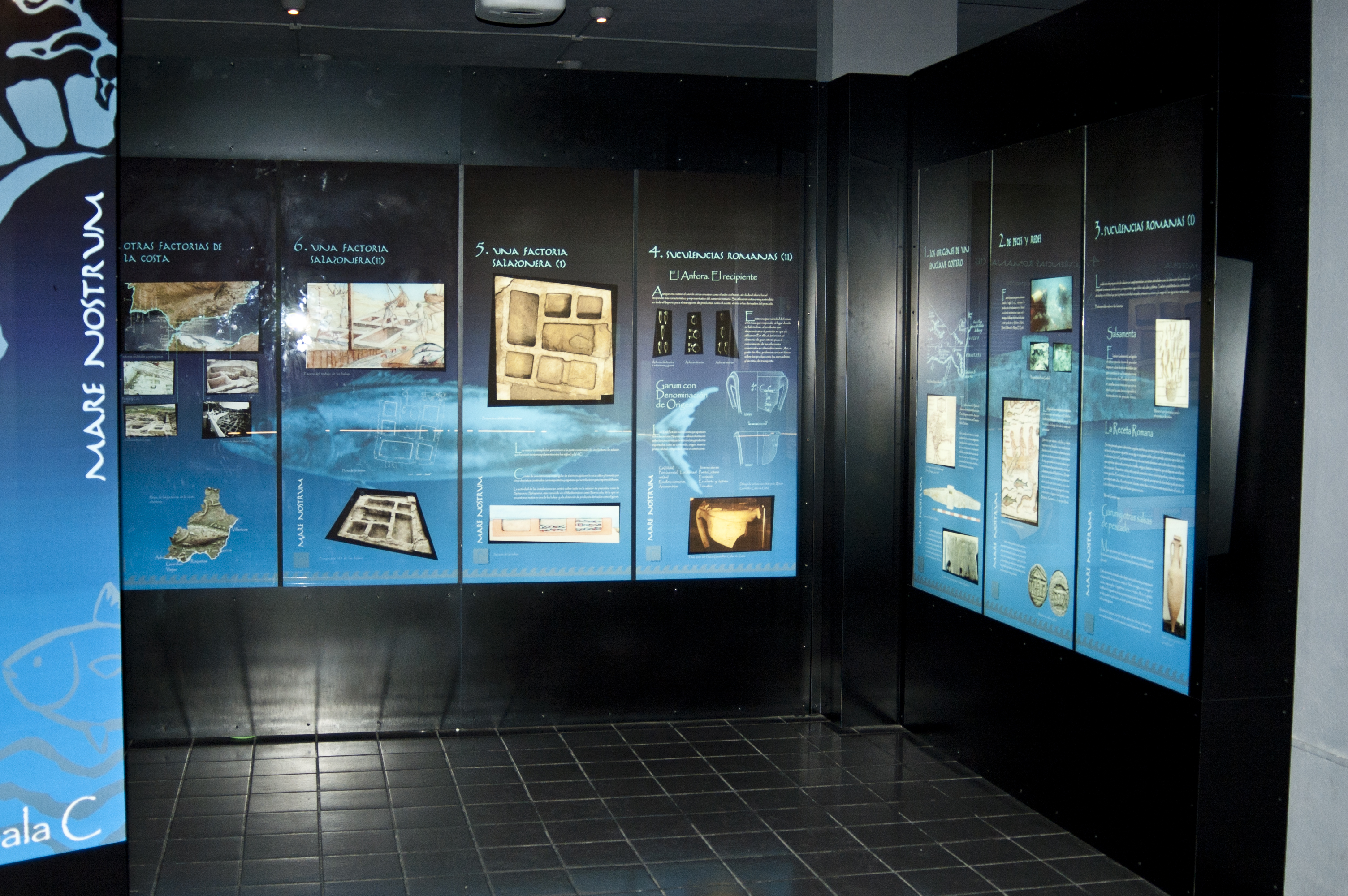 Paneles informativos de la primera sala del Enclave Arqueológico Puerta de Almería